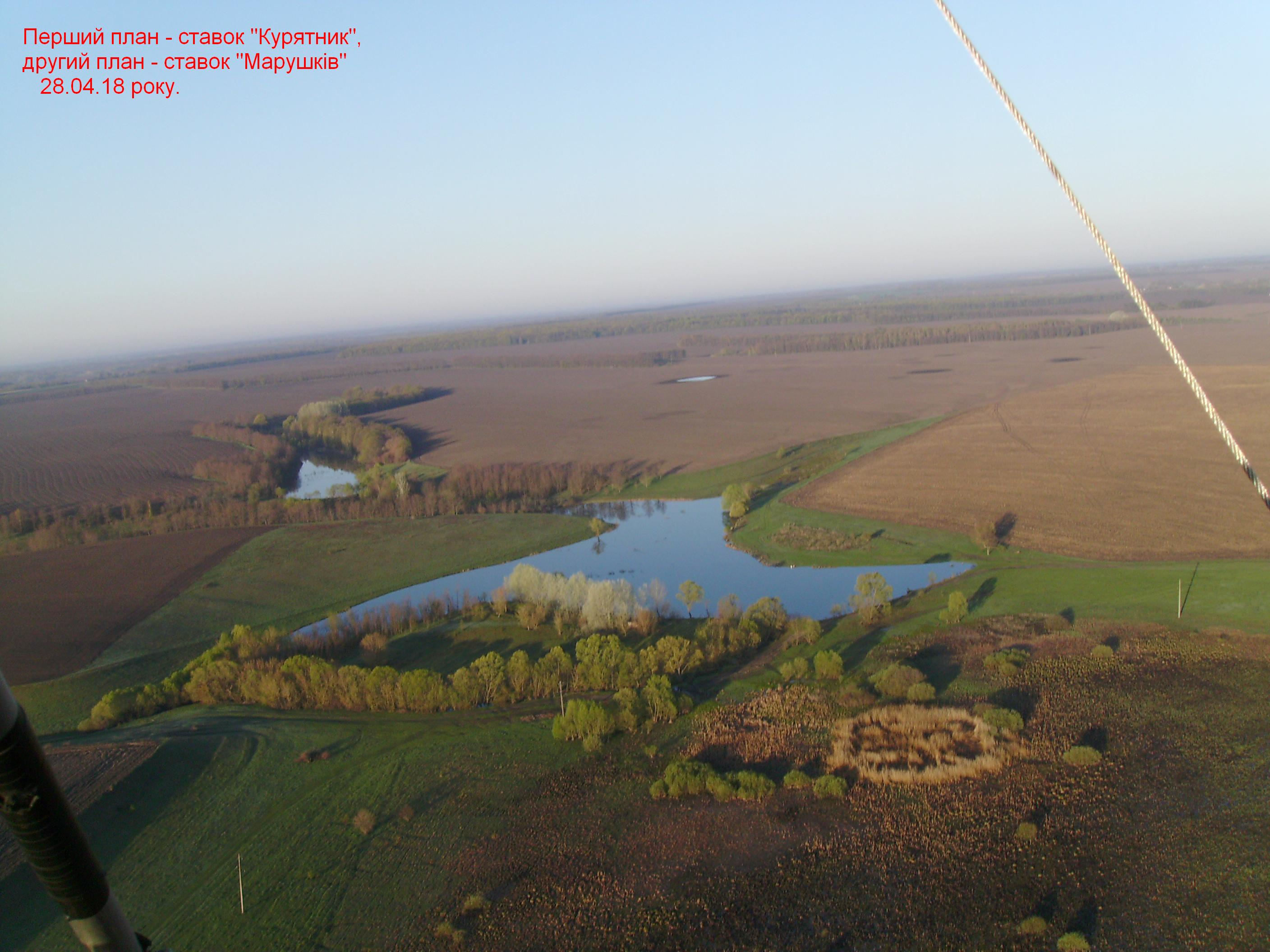 Ставки "Курятник" і "Марушків"